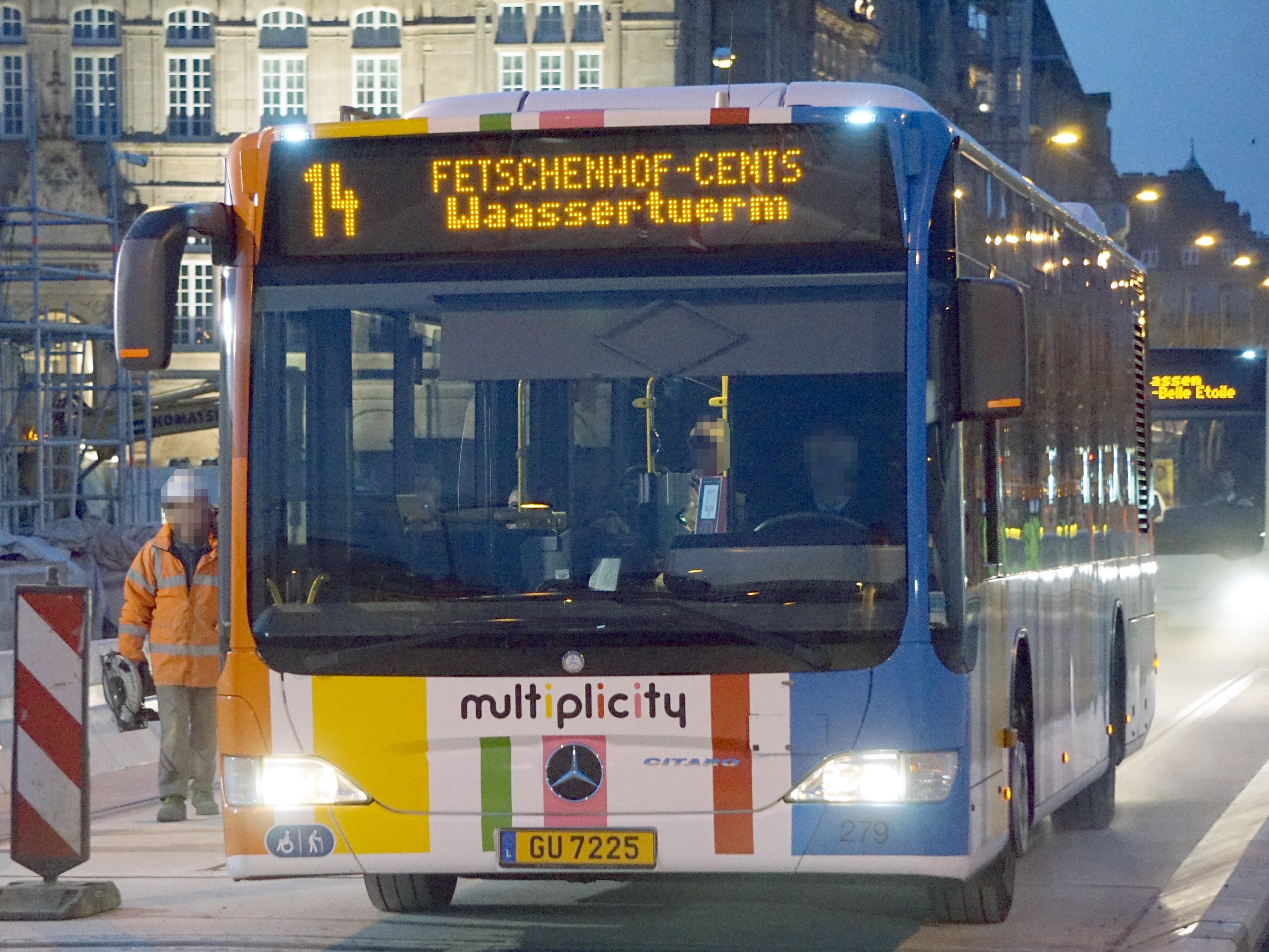 Lëtzebuerg, AVL Bus 279, Linn 14 op der Neier Bréck a Richtung Zens